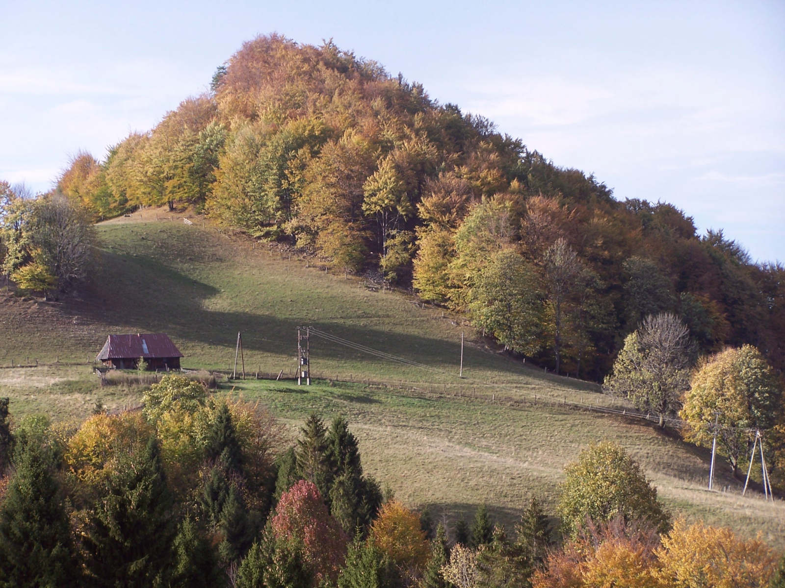 Homole (szczyt, Małe Pieniny)